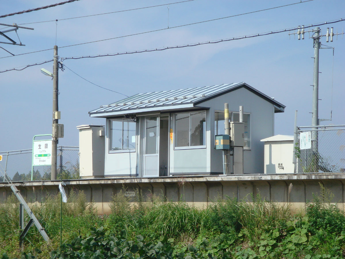 JR田沢湖線生田駅 本人撮影 2006/10/01